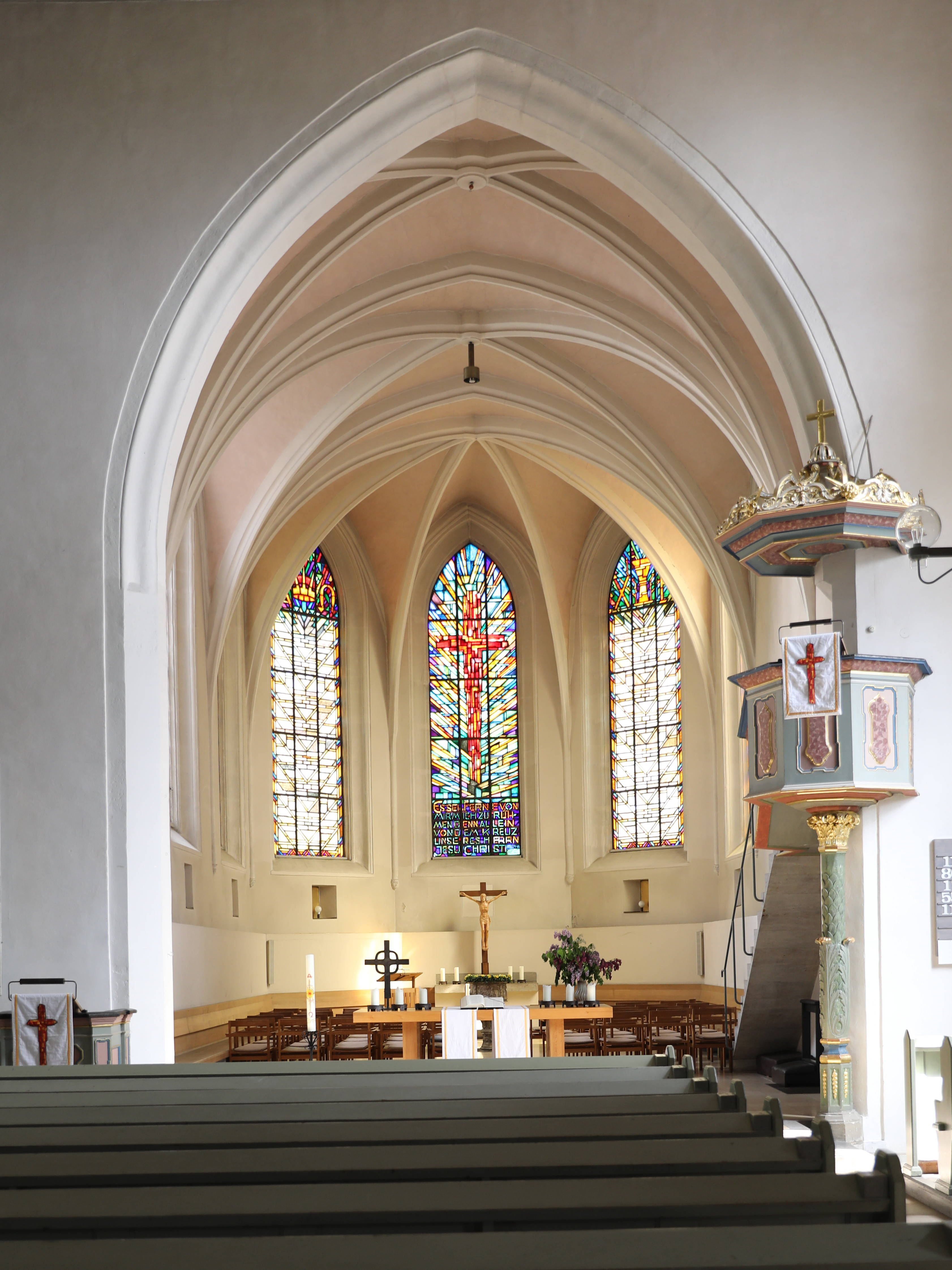 Ev. Heiligkreuzkirche, Coburg